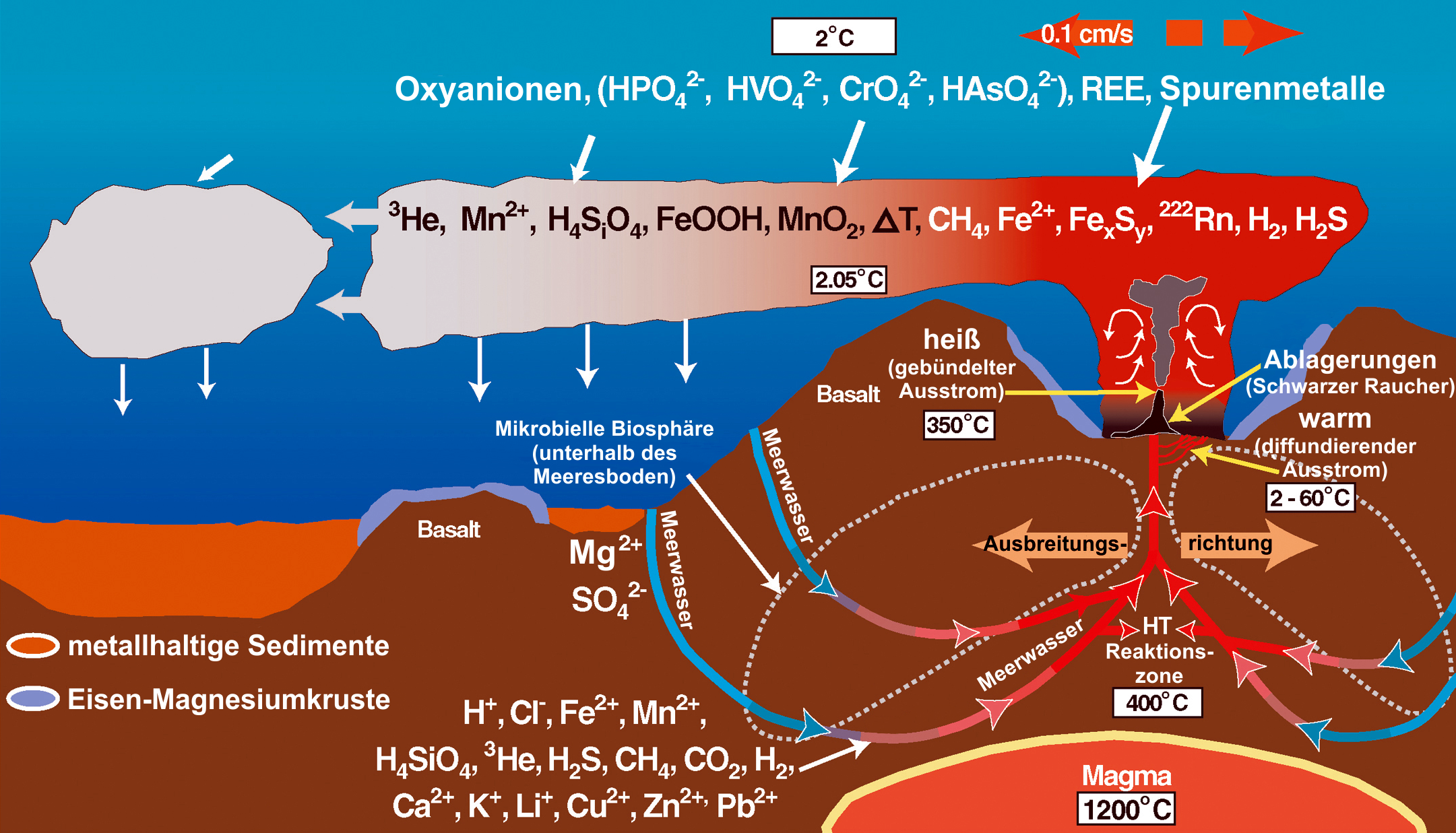 Strömungsschema einer Hydrothermalquelle der Tiefsee (Schwarzer Raucher), mittelozeanischer Rücken